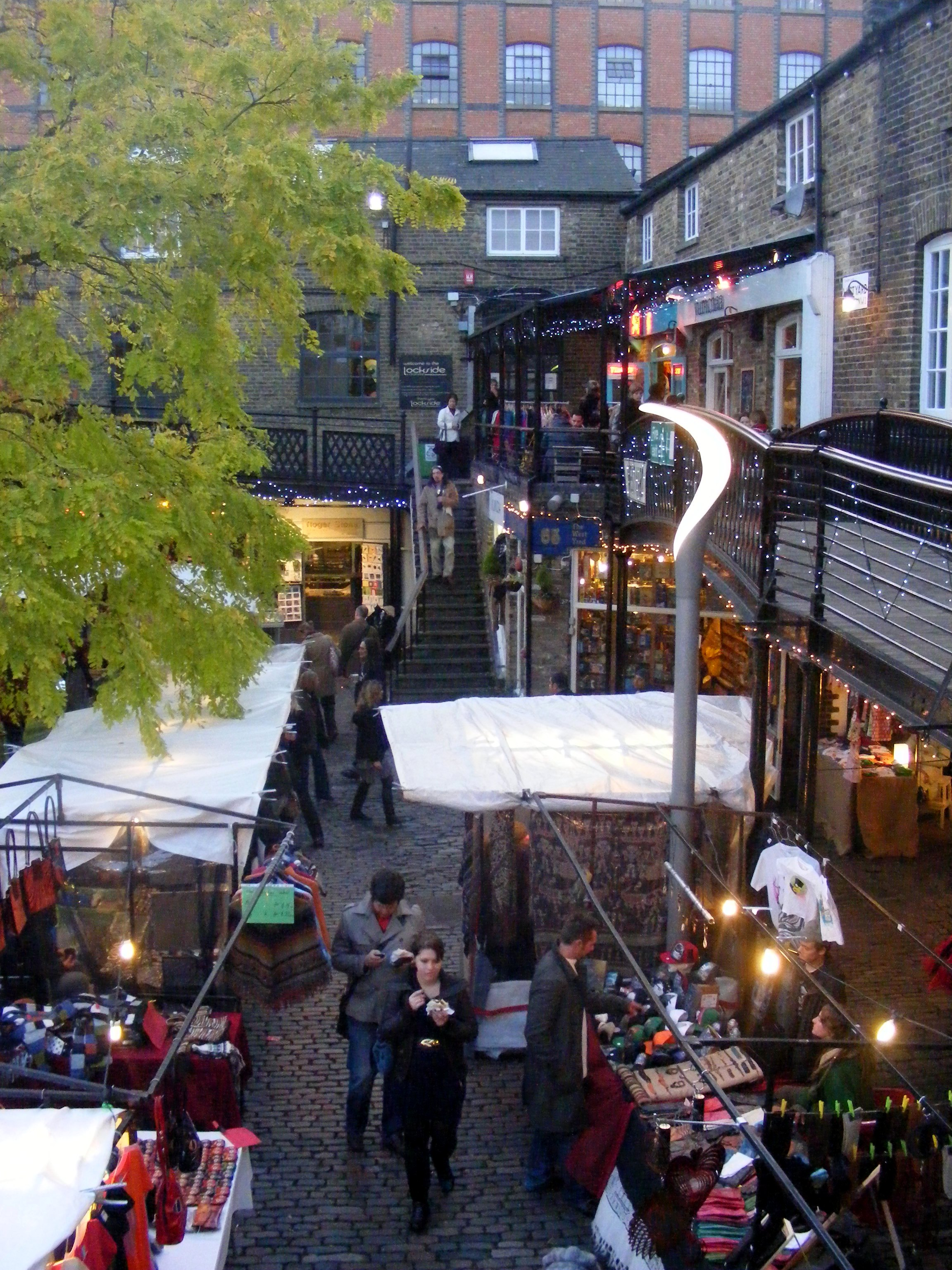 camden lock market